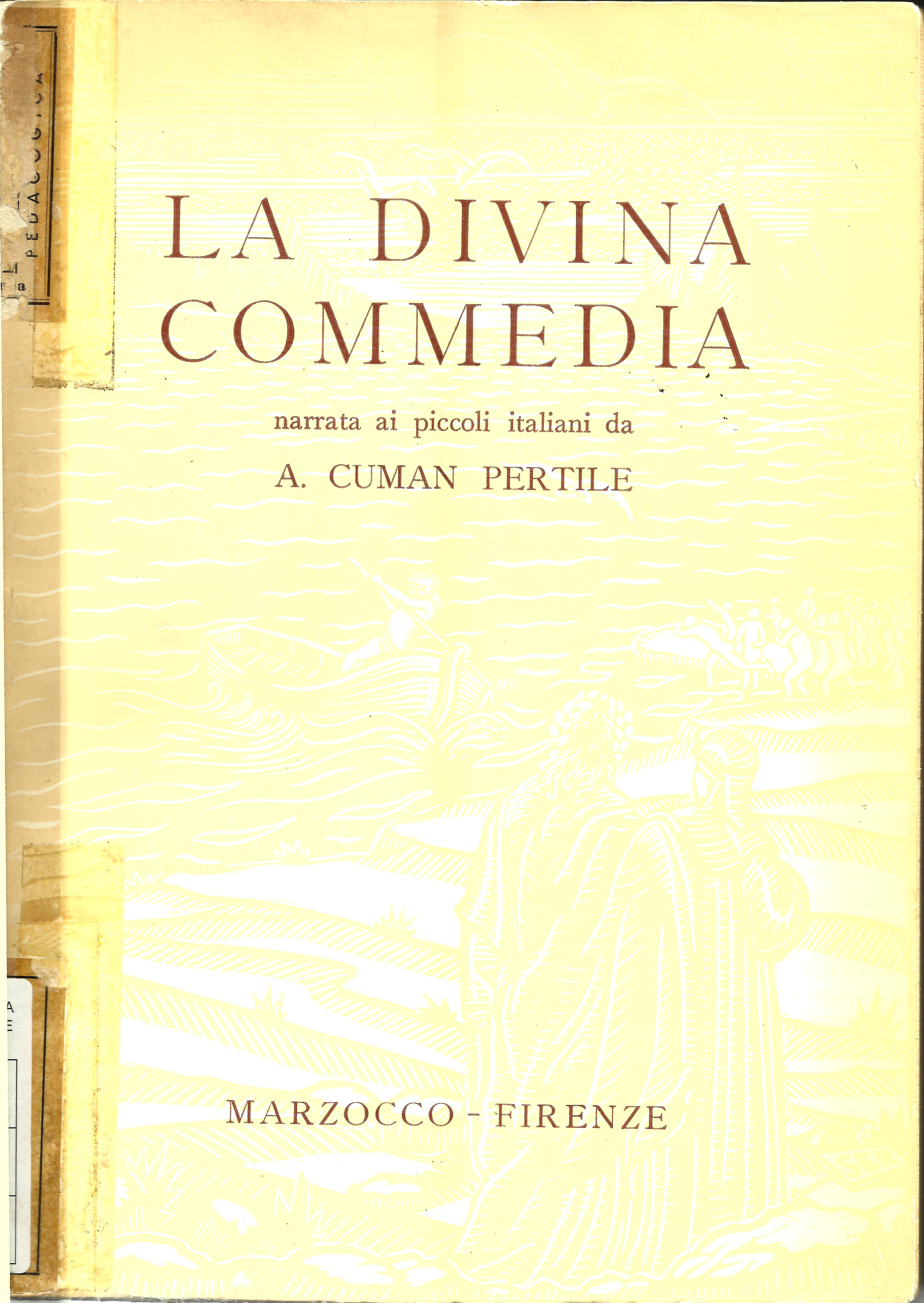 Copertina La divina commedia narrata ai piccoli italiani di Arpalice Cuman Pertile